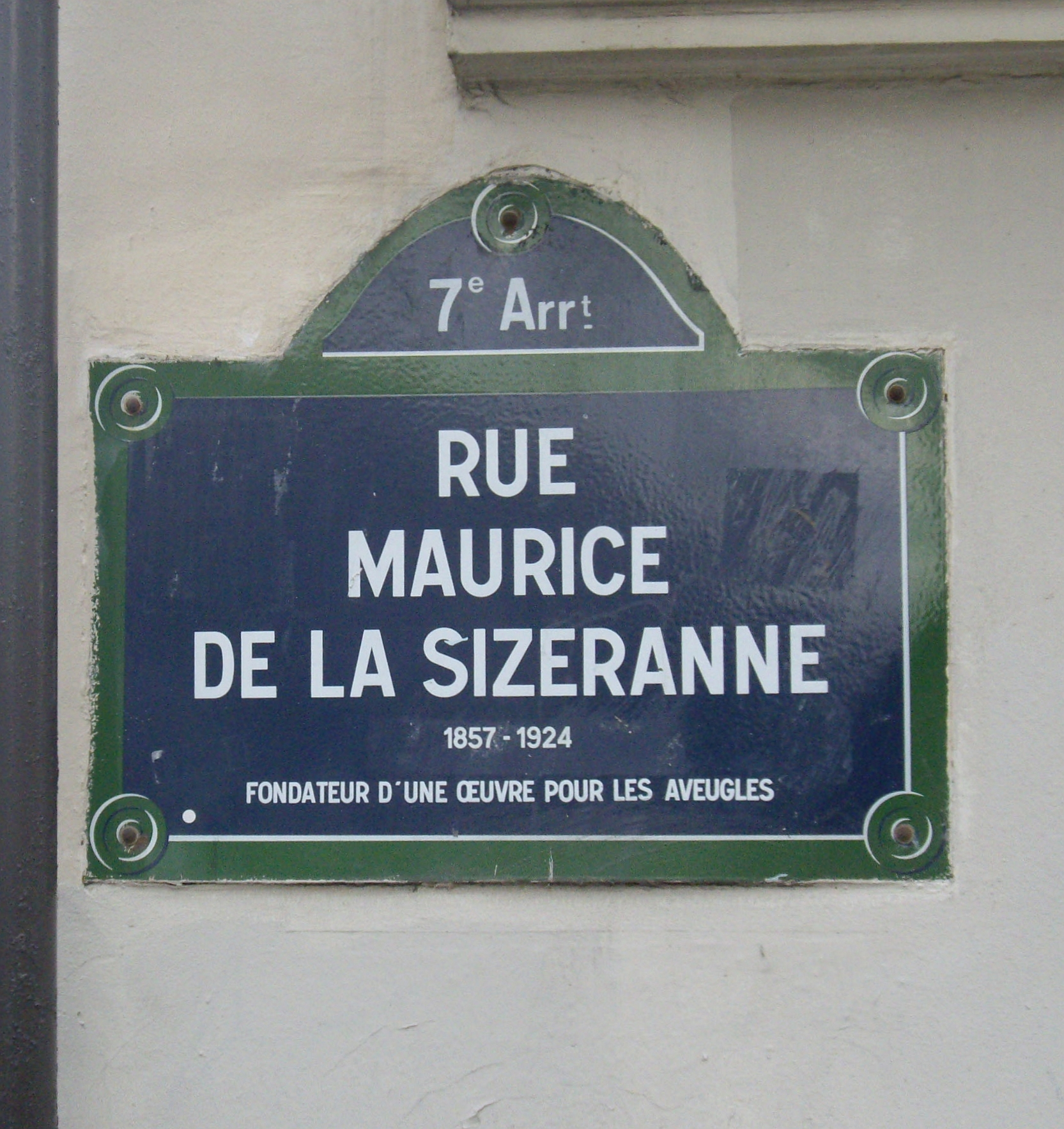 Rue Maurice-de-La-Sizeranne, Paris 7e. « Maurice de La Sizeranne, 1857-1924, fondateur d'une œuvre pour les aveugles. »